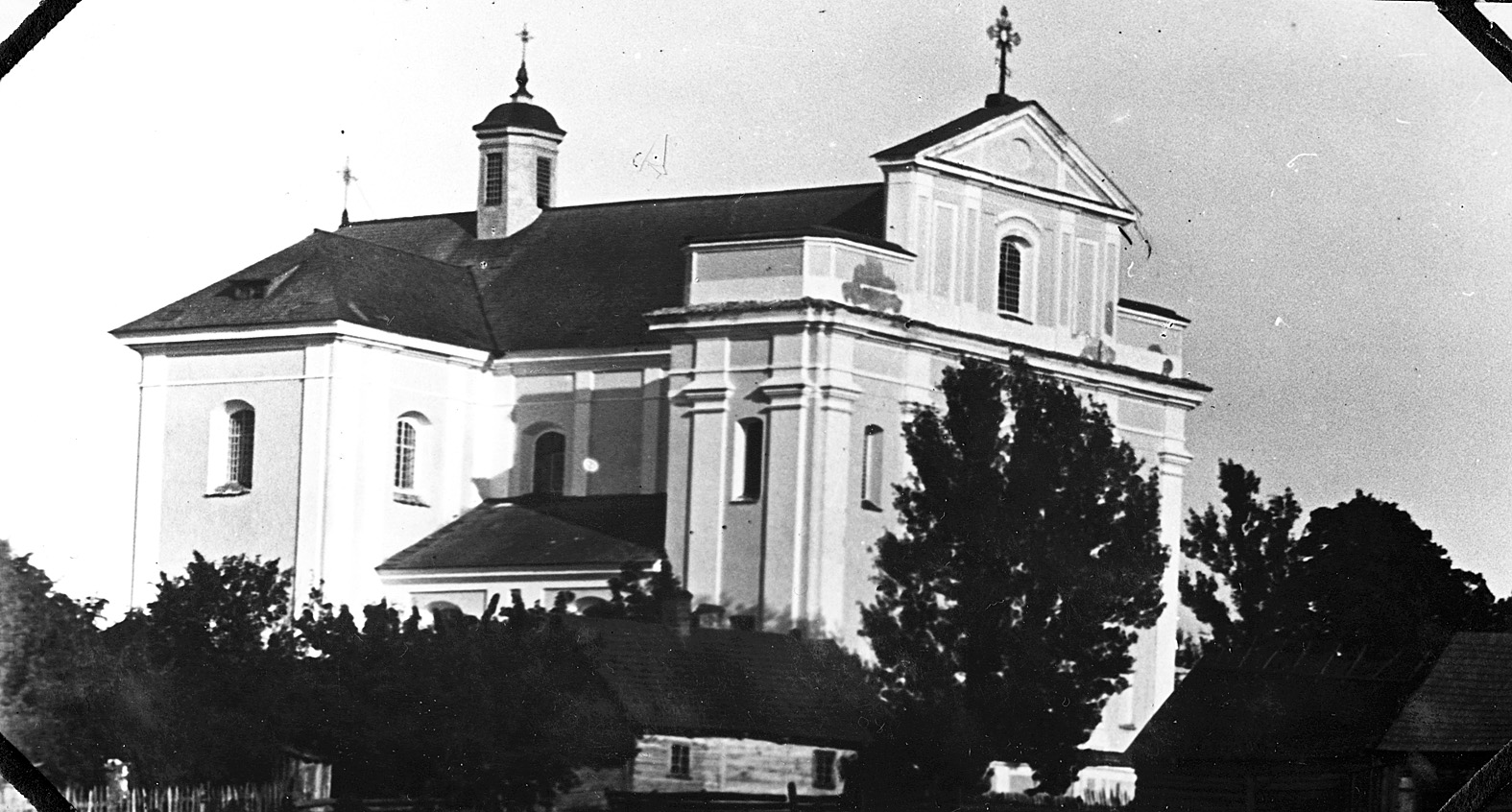 Беларуская (тарашкевіца): Бераставіца Вялікая (Bierastavica Vialikaja), рог пляцу Рынку (plac Rynak) і вуліцы Хадкевічаўскай (vulica Chadkievičaŭskaja). Касьцёл Візытацыі Найсьвяцейшай Панны Марыі